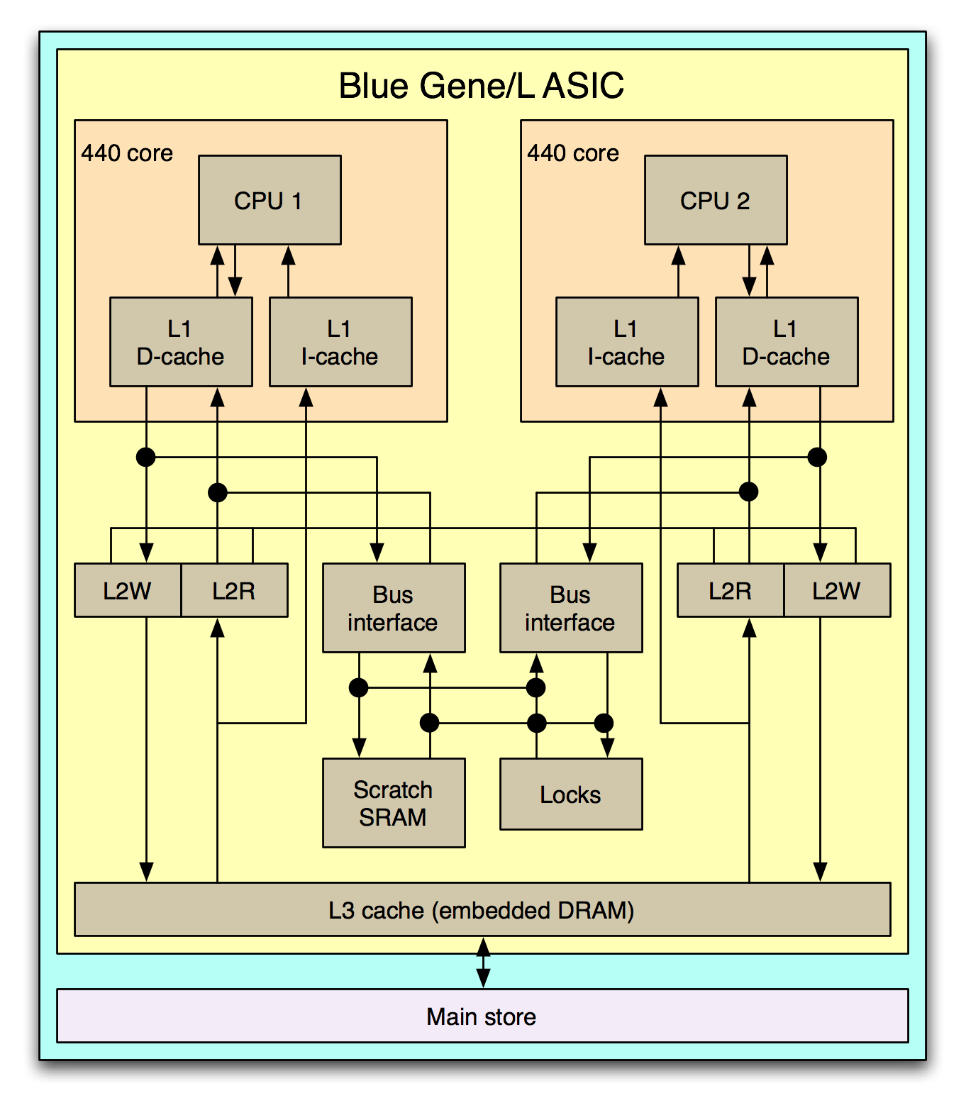 Schema ASIC Blue Gene/L